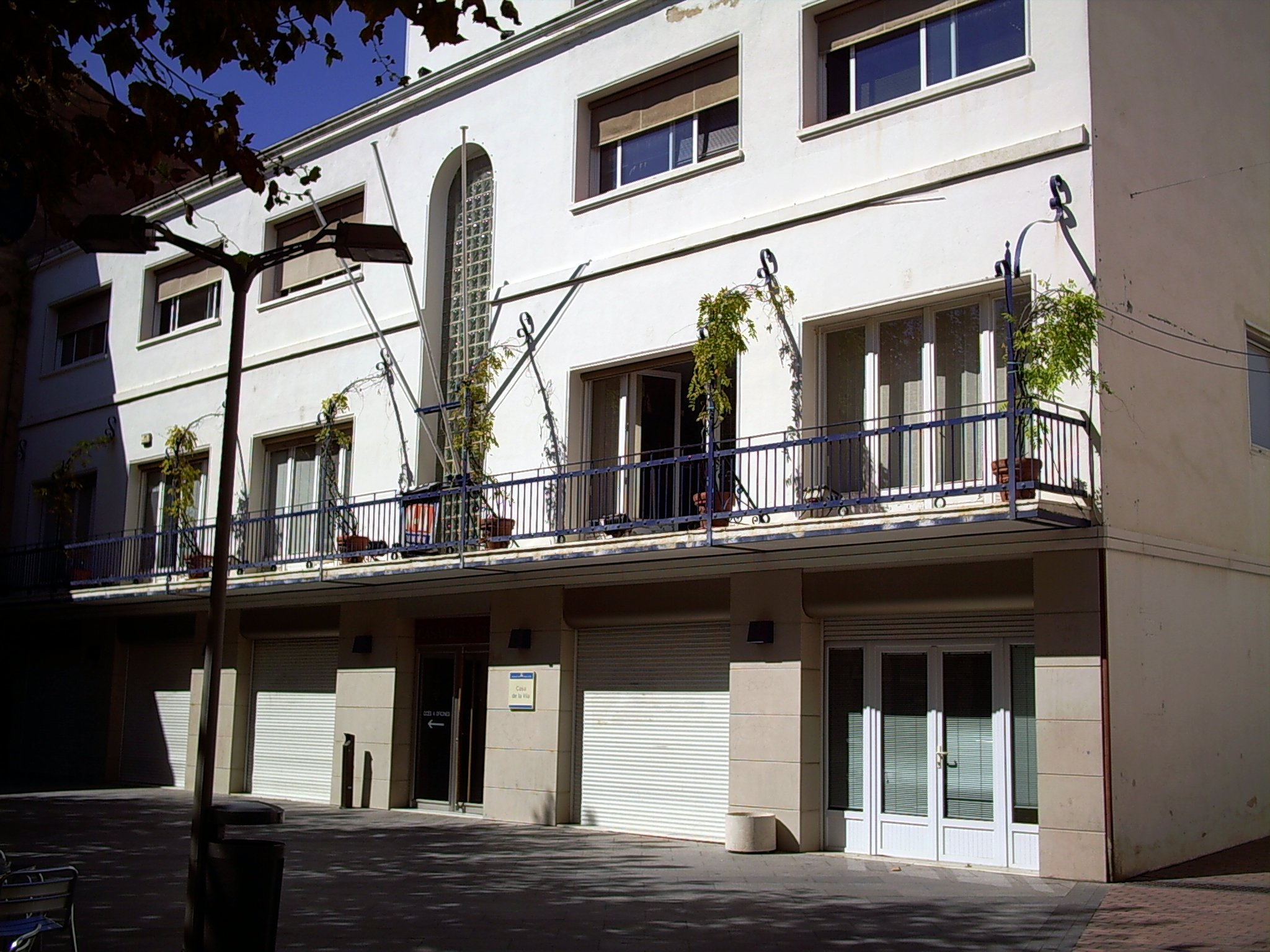 Ajuntament de Premià de Mar, comarca del Maresme, (Catalunya).